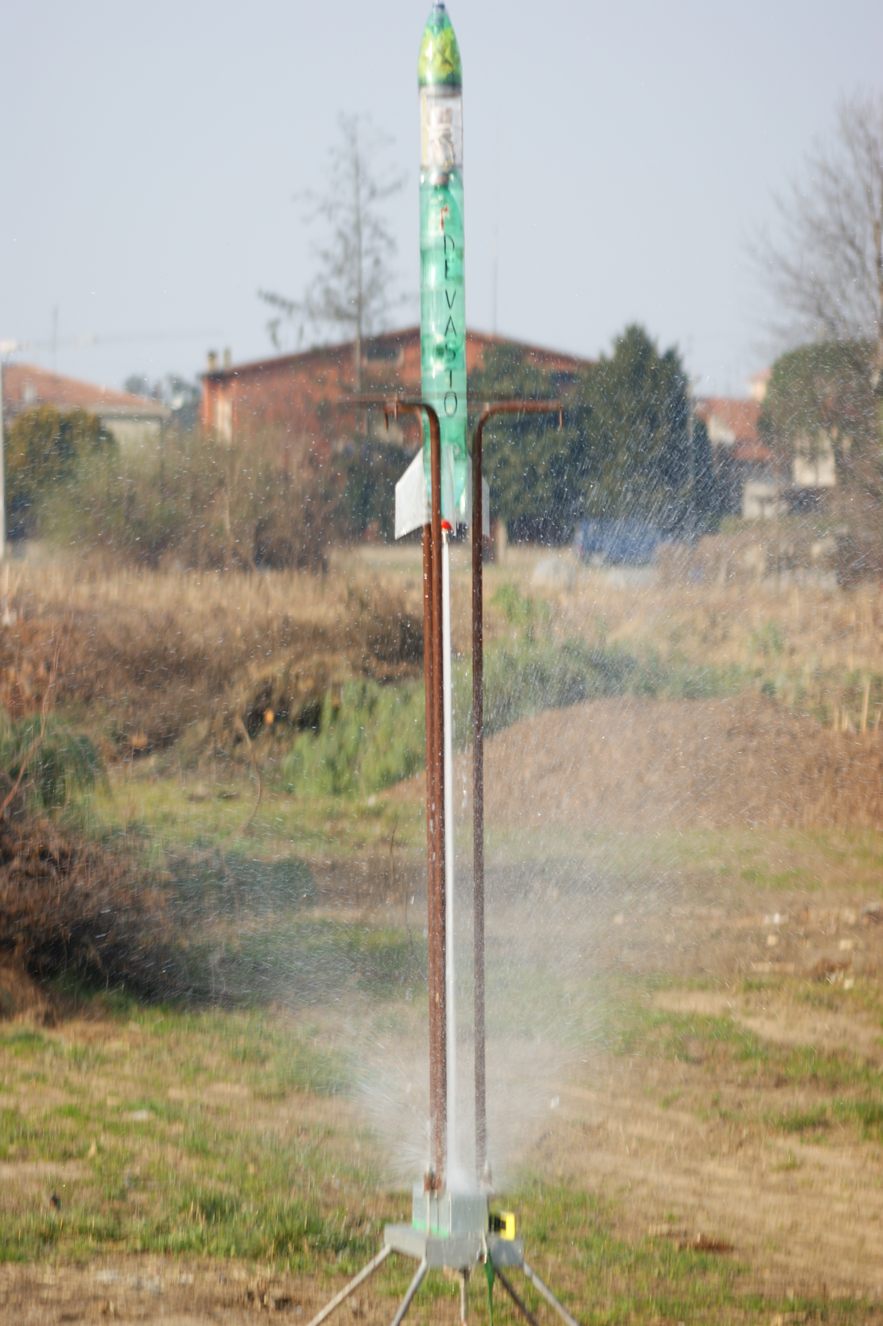 Il getto d'acqua che fuoriesce dall'ugello in partenza